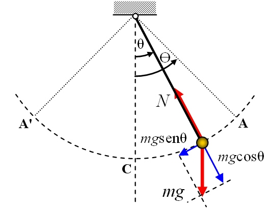 Pendulo simple - Esquema de fuerzas